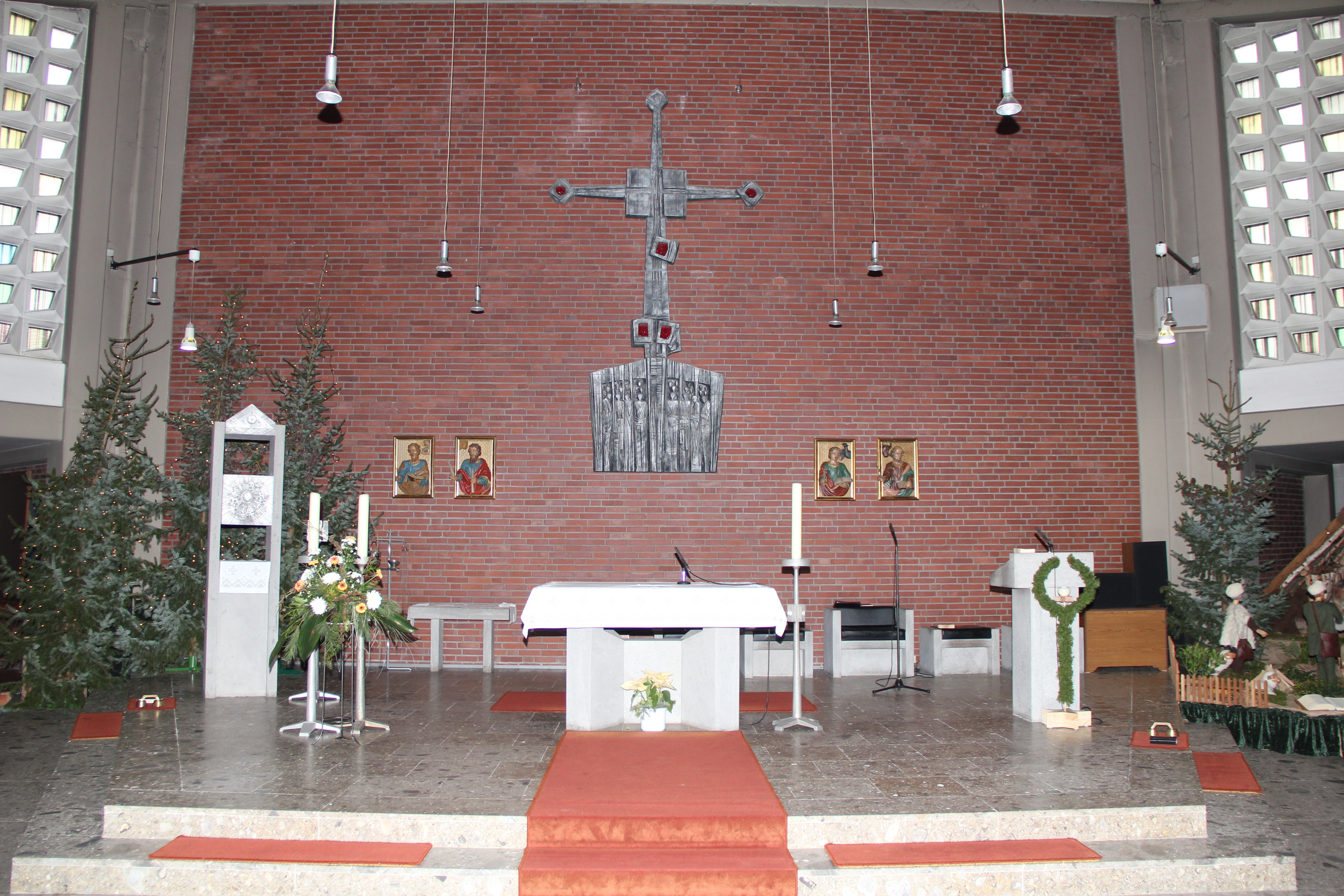 Chorraum der Dreifaltigkeitskirche in Altenoythe